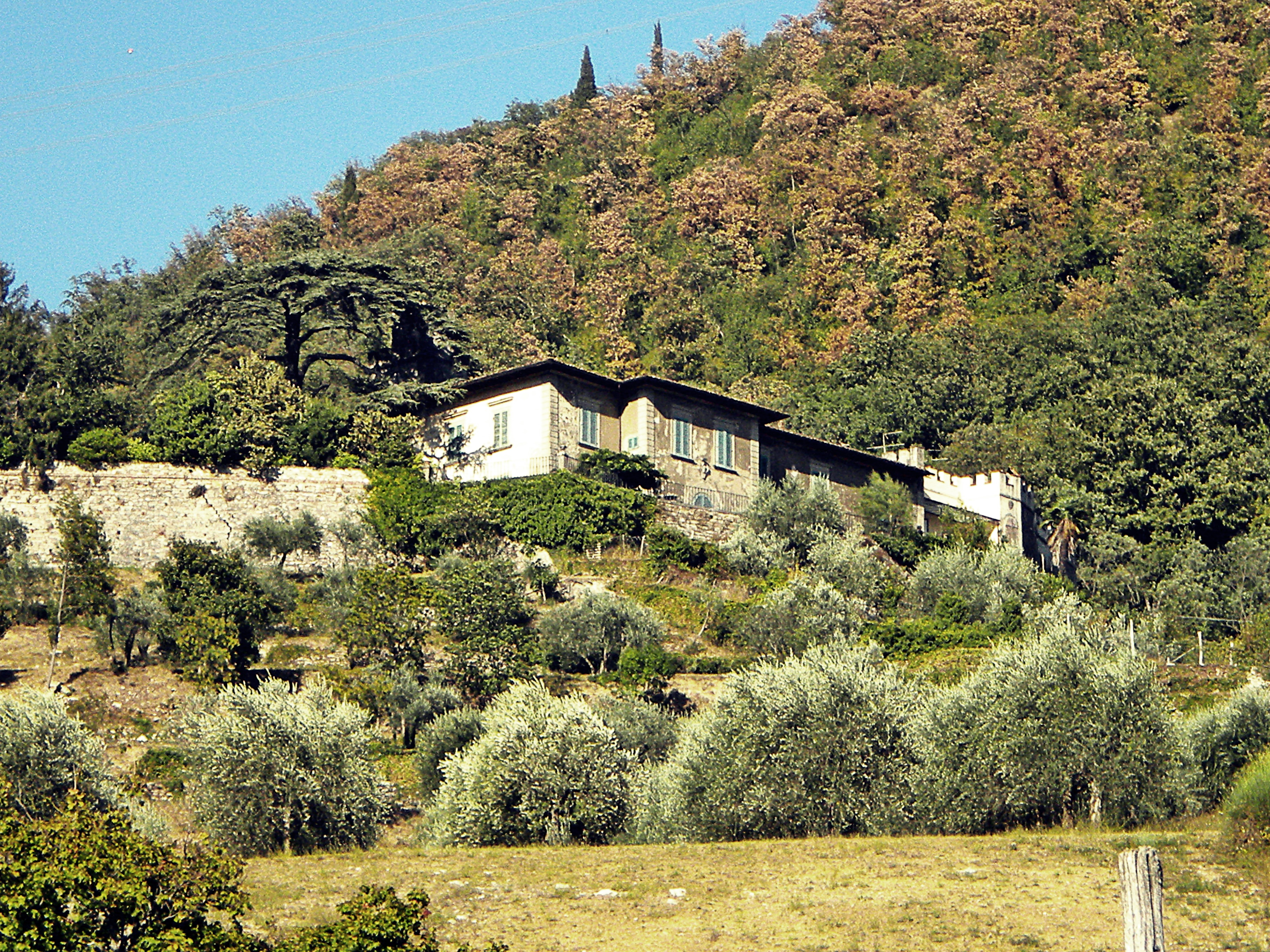 villa